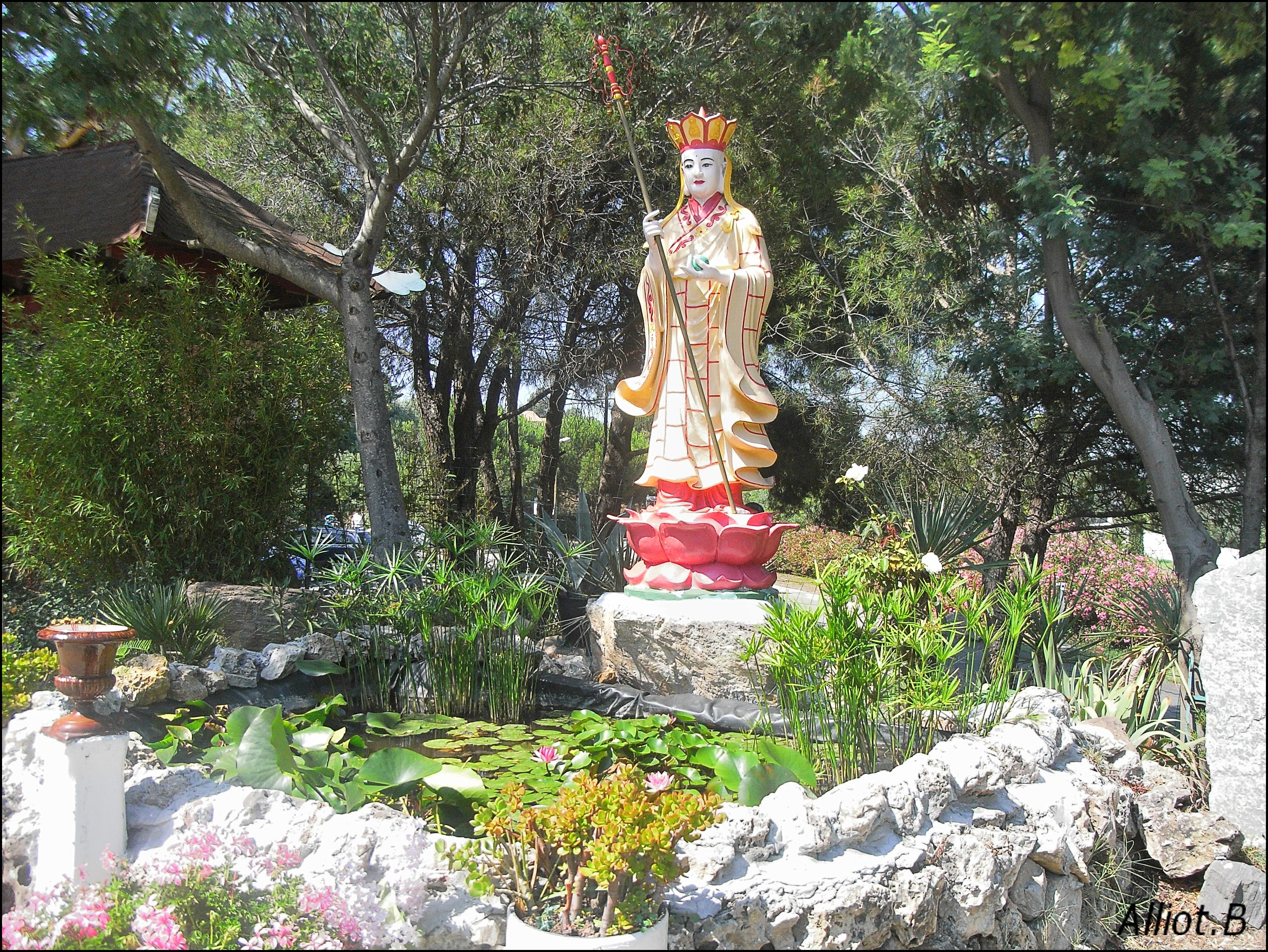 Statue de Bouddha - Pagode bouddhique de Hông Hien, Fréjus - France